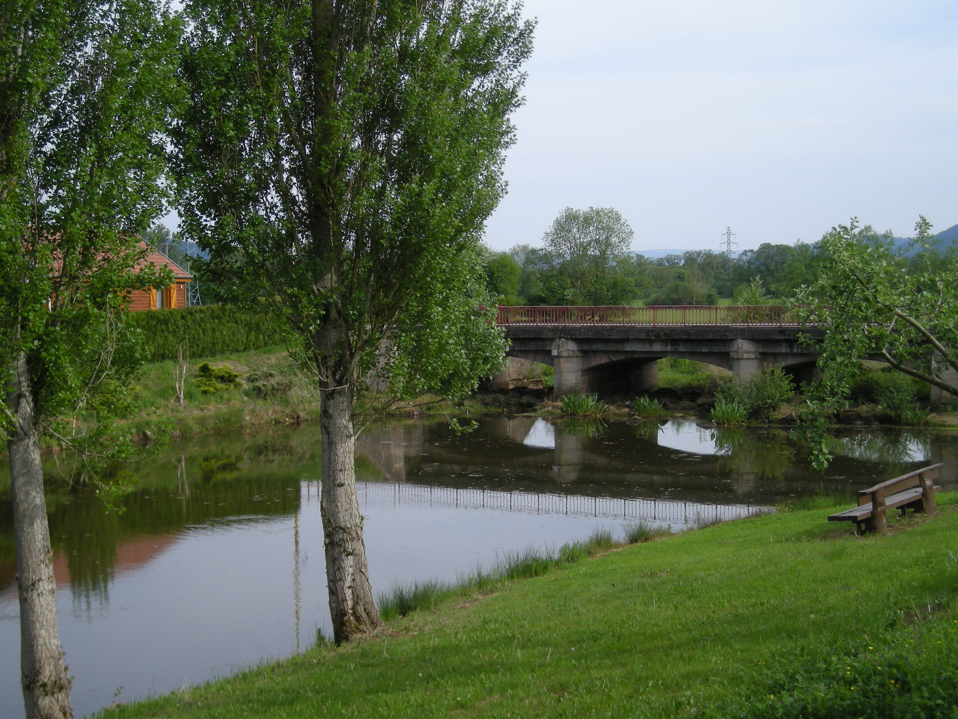 Un bras de la Meurthe à Etival-Clairefontaine (Vosges)